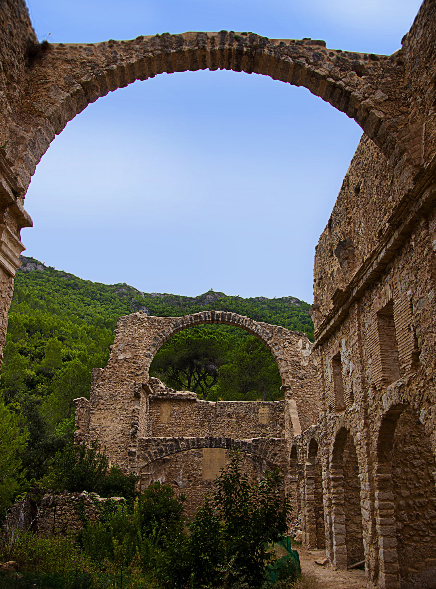 Monasterio fortificado de Nuestra Señora de la Murta